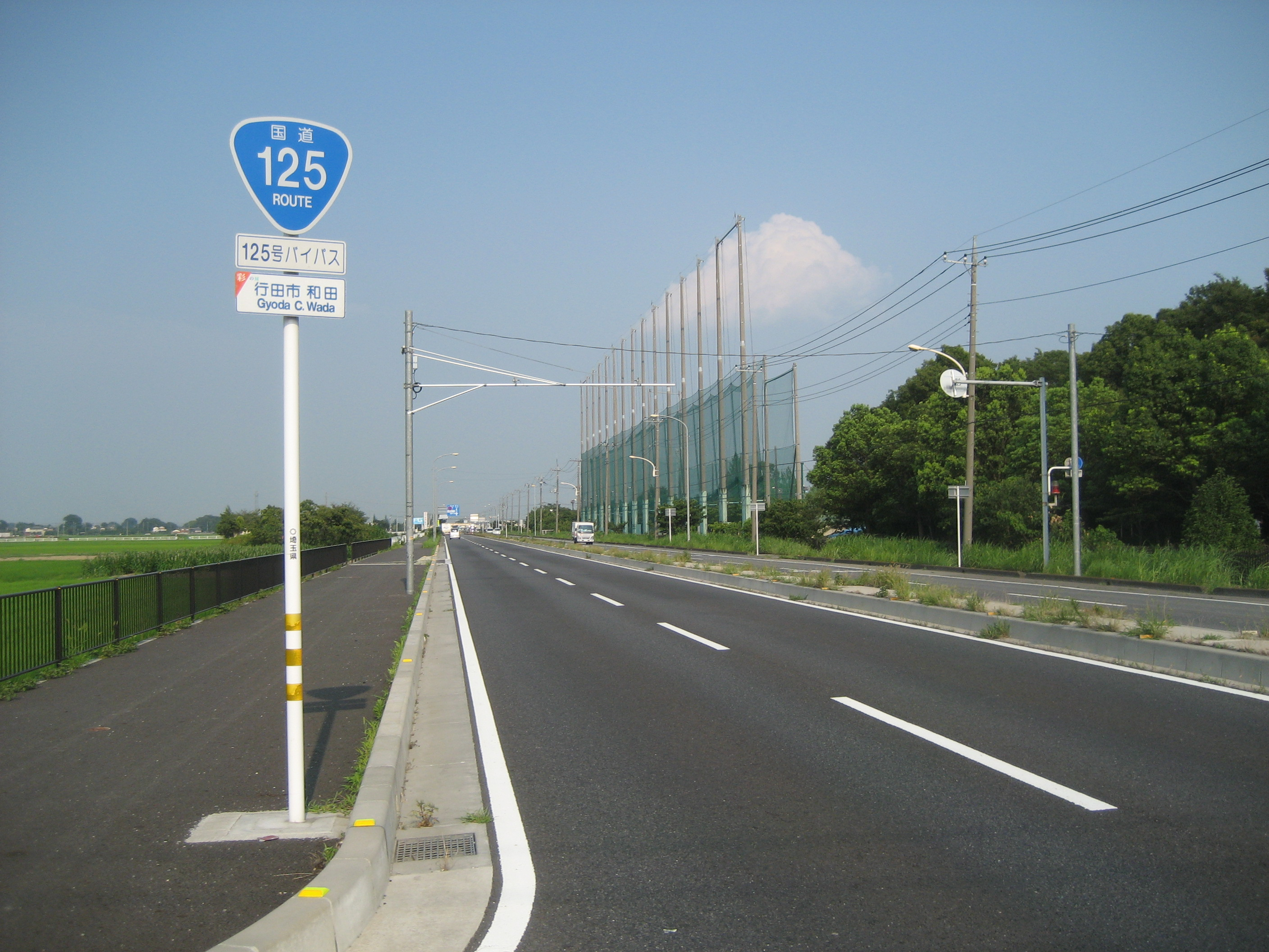 国道125号線行田バイパス 埼玉県行田市和田付近（加須市方面を撮影）